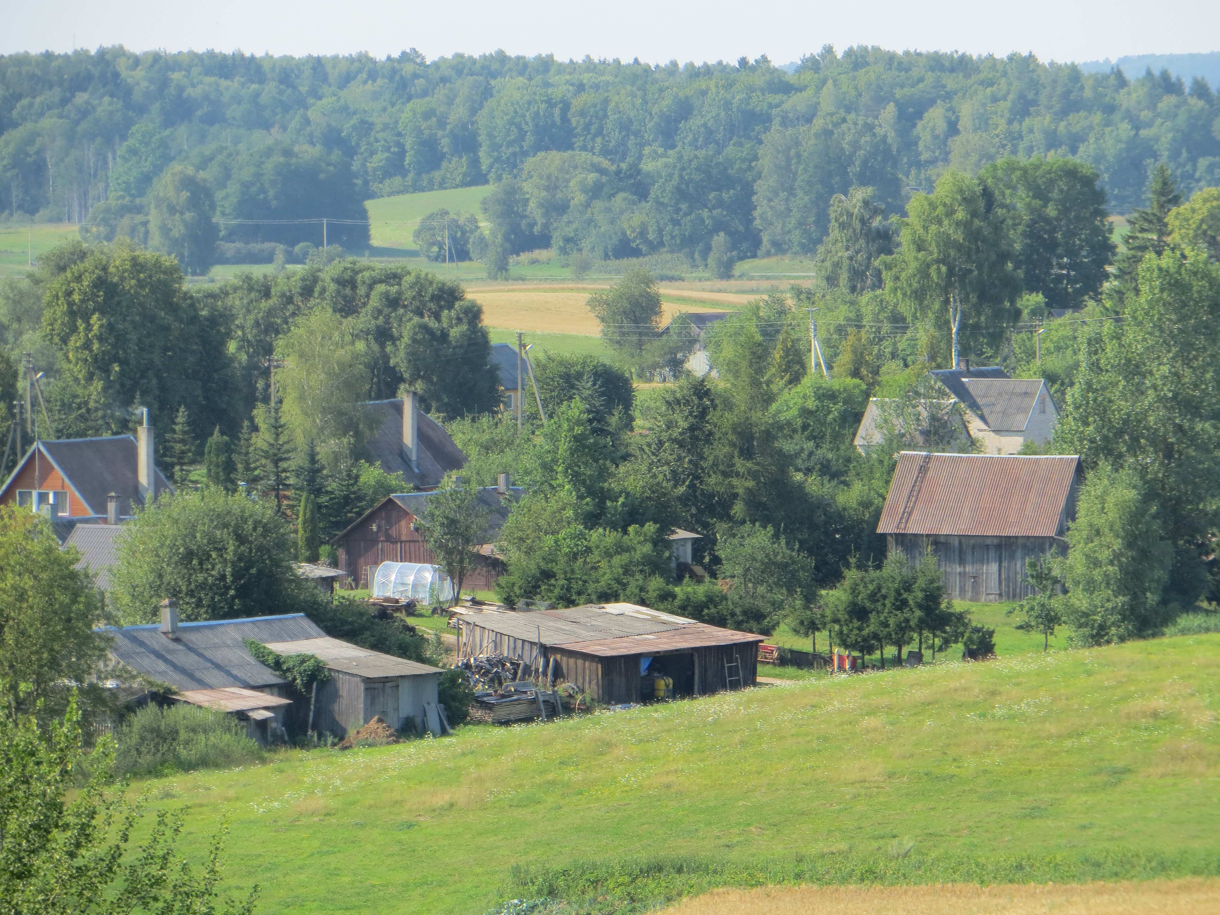 Avižieniai, Lithuania